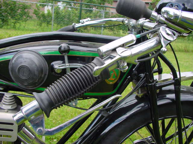 Varie leve di una motocicletta. Manopola con i vari comandi.